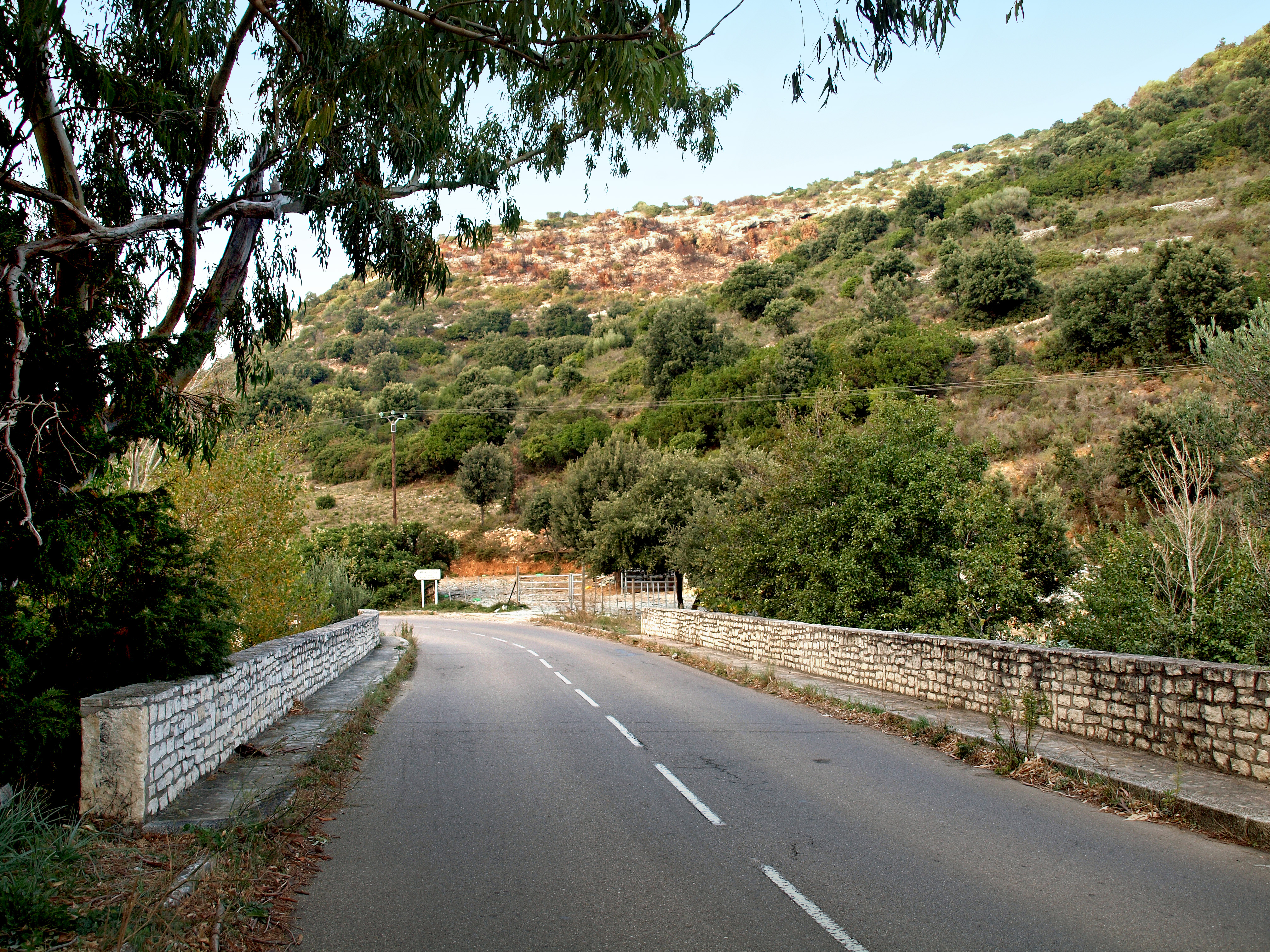 Patrimonio, Nebbio (Corse) - Pont Albino de la route D80 sur le Fium'Albino